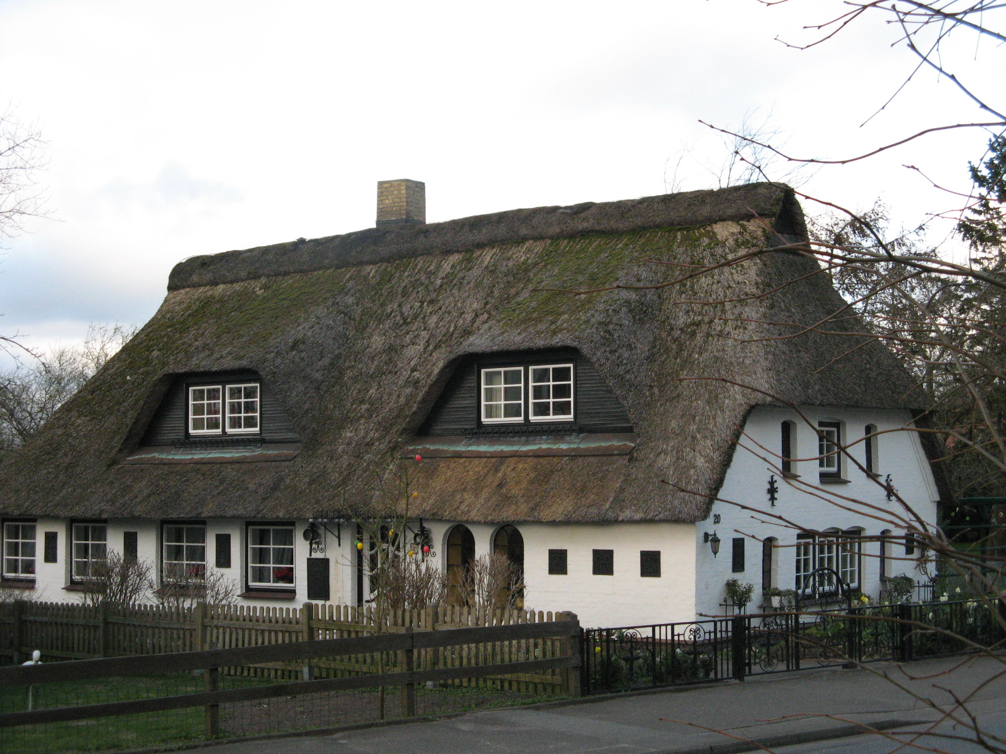 Farm in Hollingstedt, bellfry Author: Dirk Ingo Franke